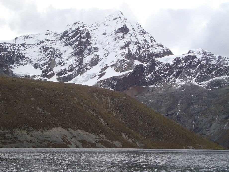 Nevado y laguna de Llongote en la provincia de Yauyos.